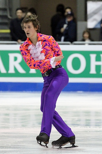 Максим Ковтун на финале Гран-при среди юниоров сезона 2011-2012